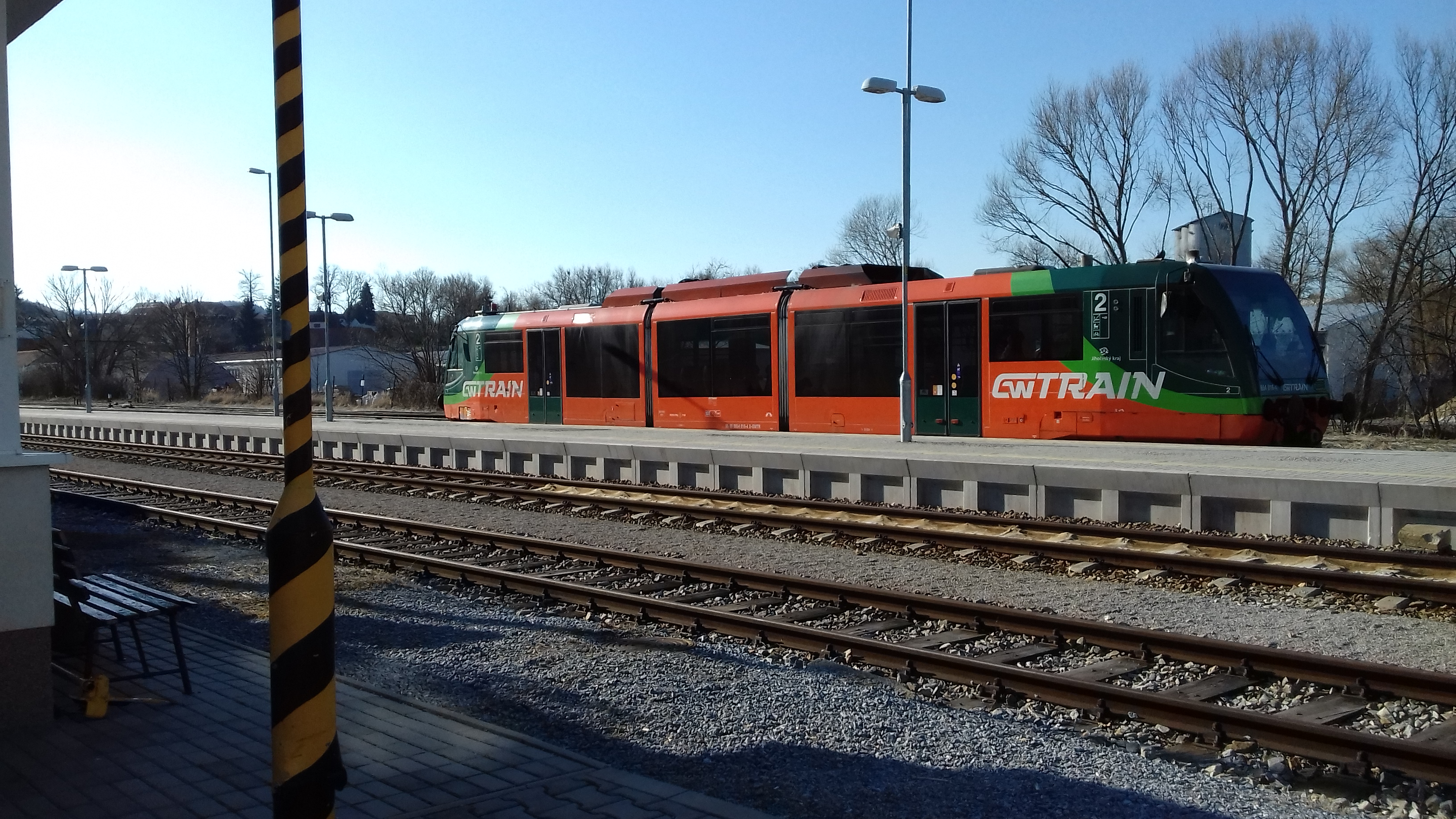 soukromý dopravce veze výletníky z Šumavy